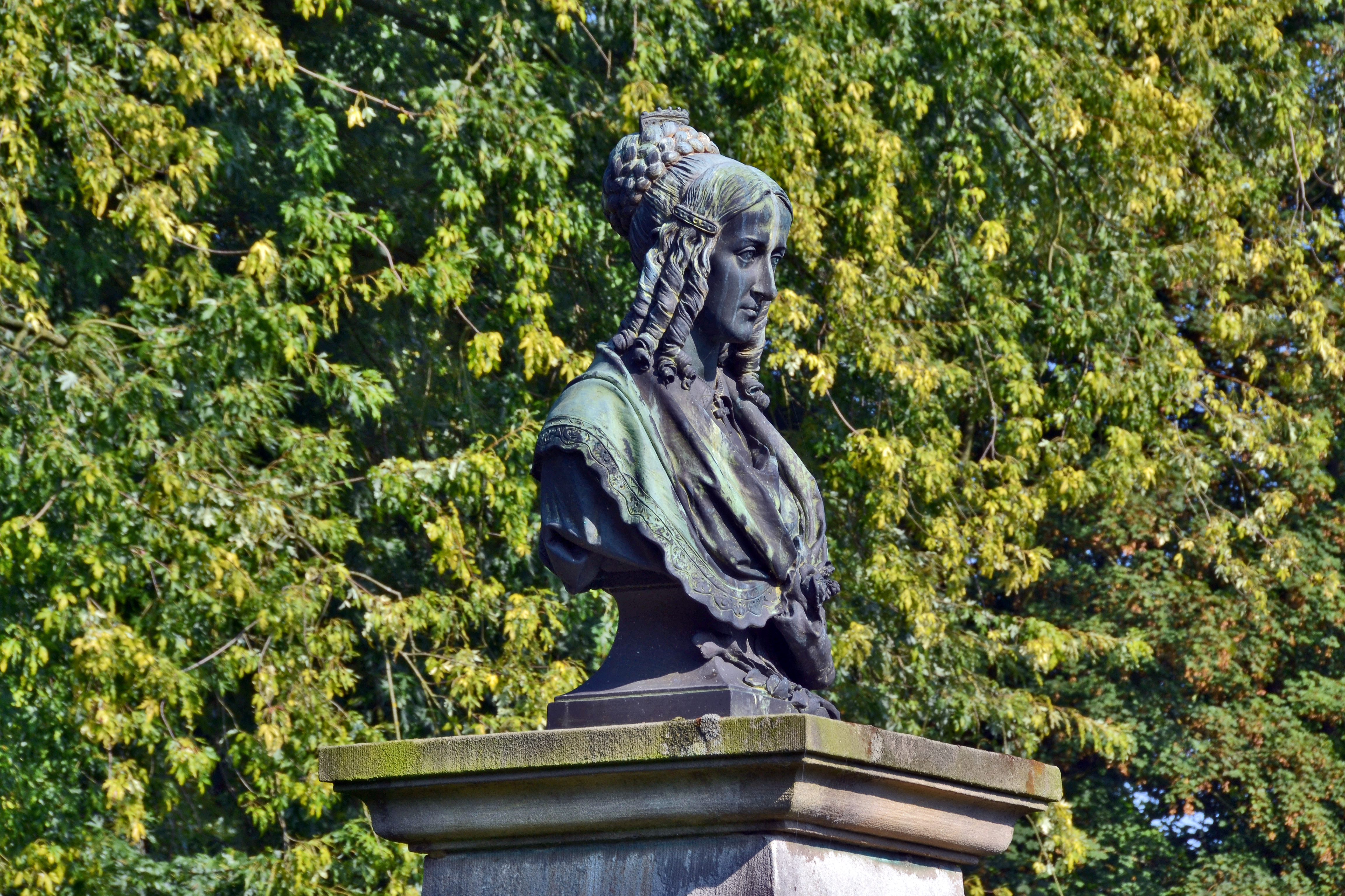 Anette von Droste-Hülshoff Büste im Burggarten